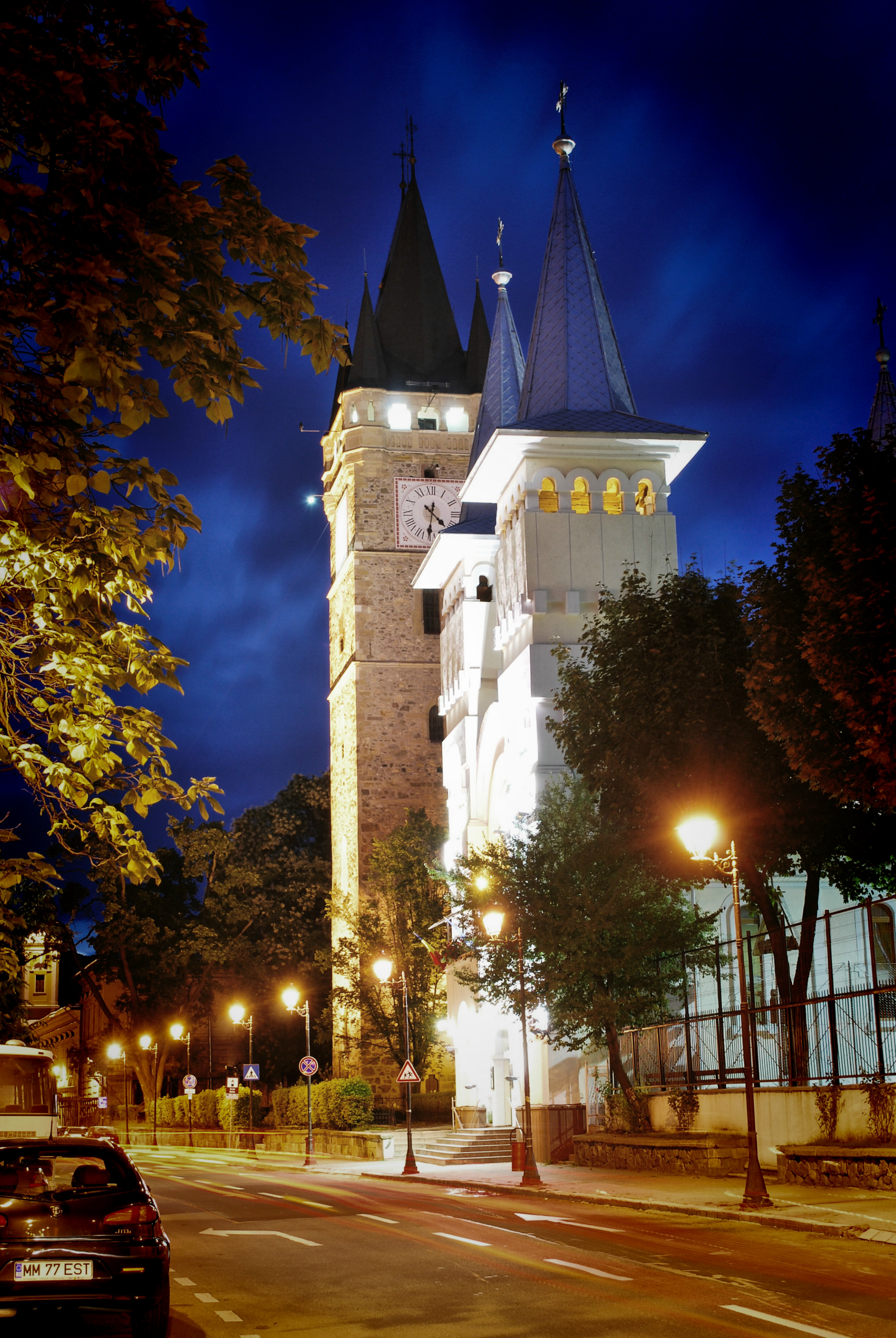 Noaptea